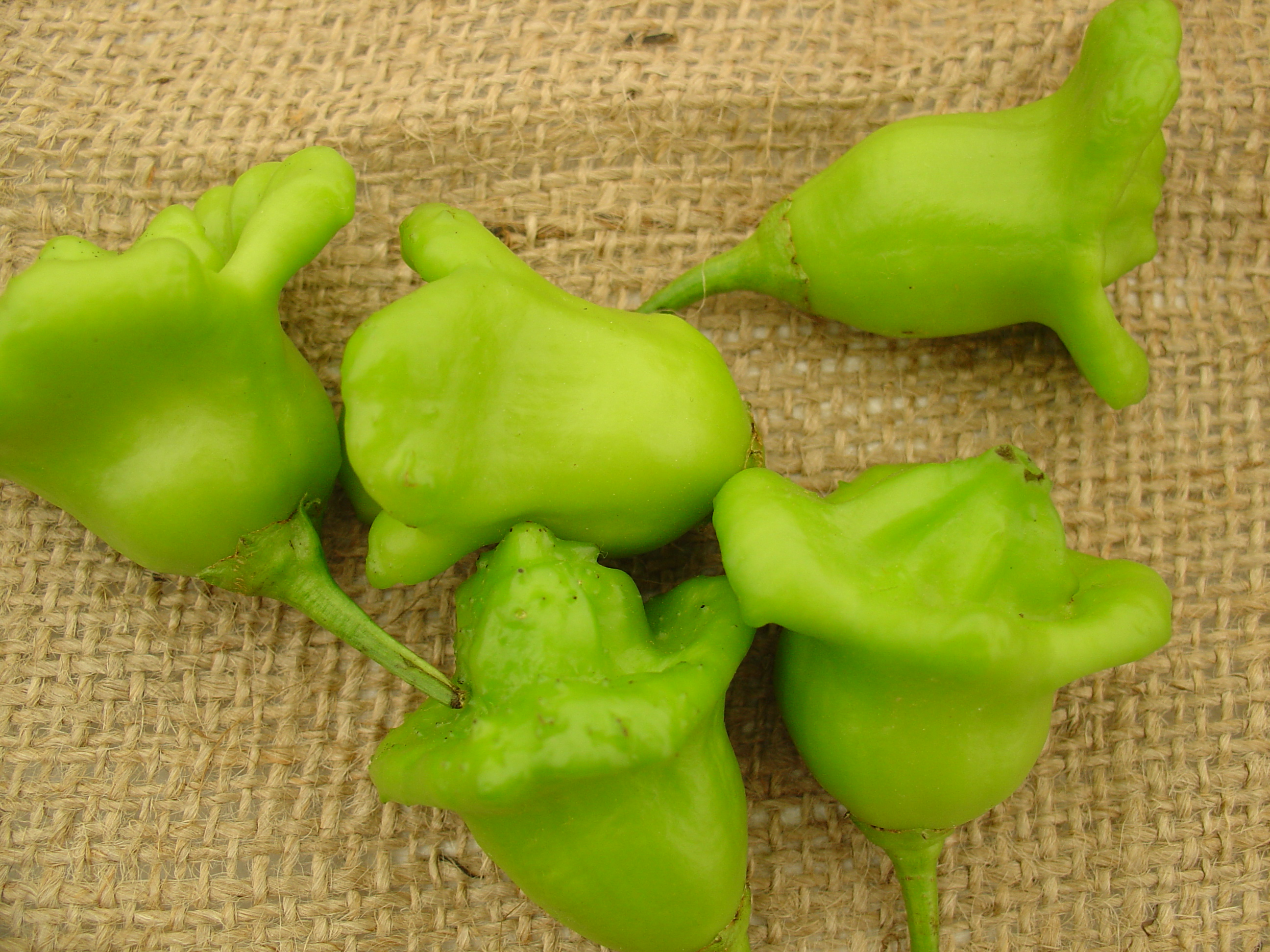 Variedad tradicional española de pimiento (Capsicum baccatum) denominada pimiento campanilla.